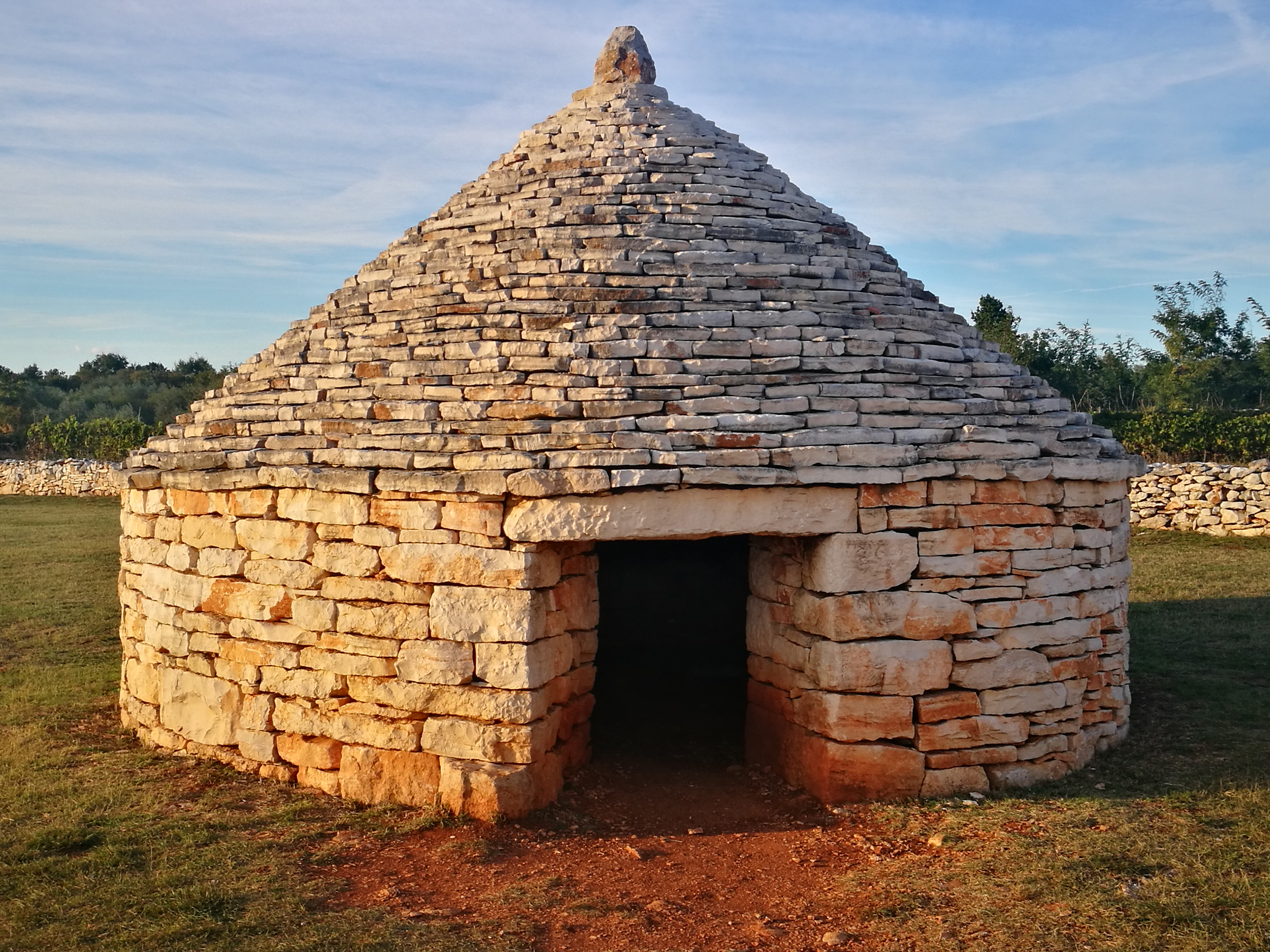 Kroatien (HR) - Gespanschaft Istrien (036) - Vodnhan: Kažun im "Park der Steinhütten"